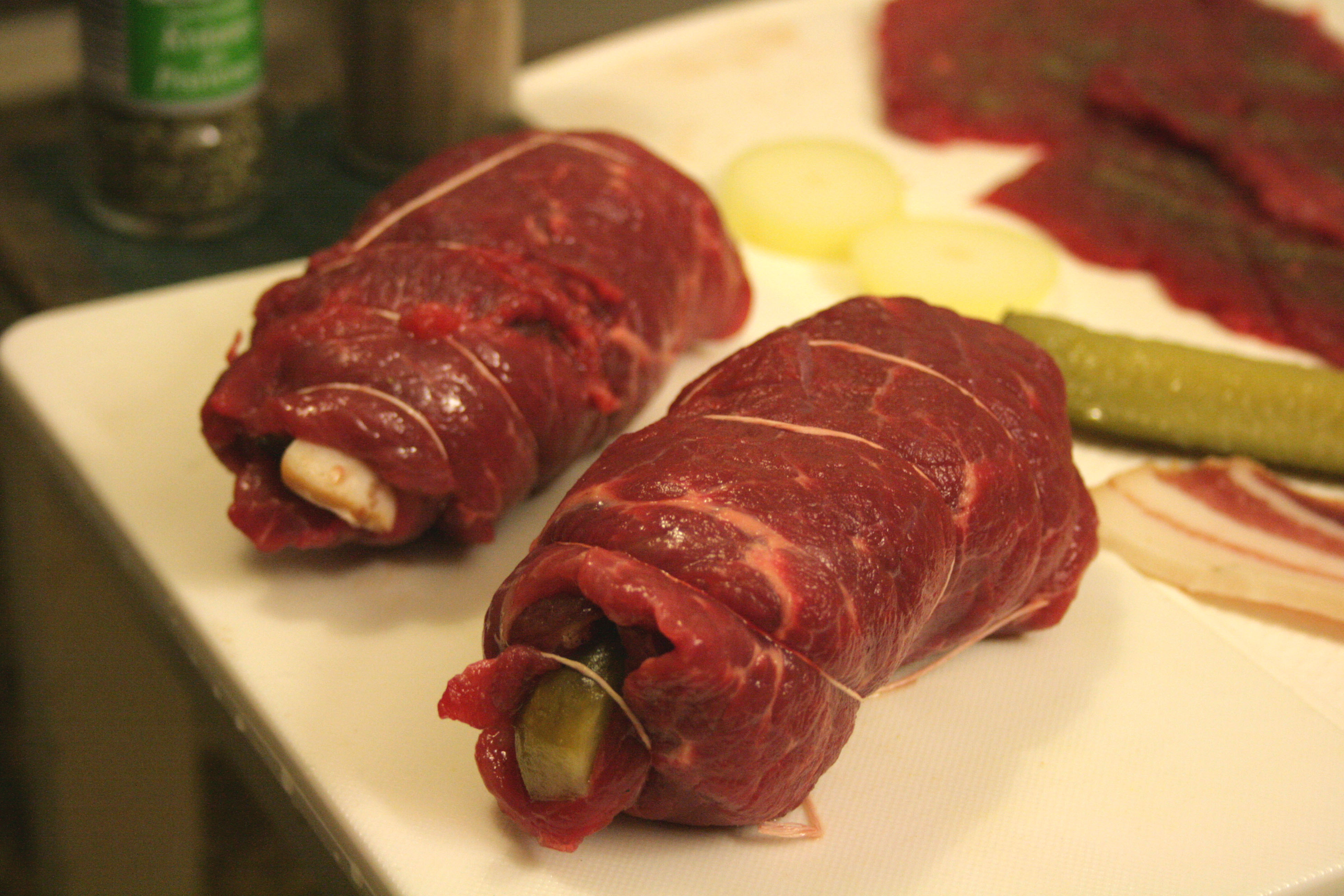 Rinderroulade